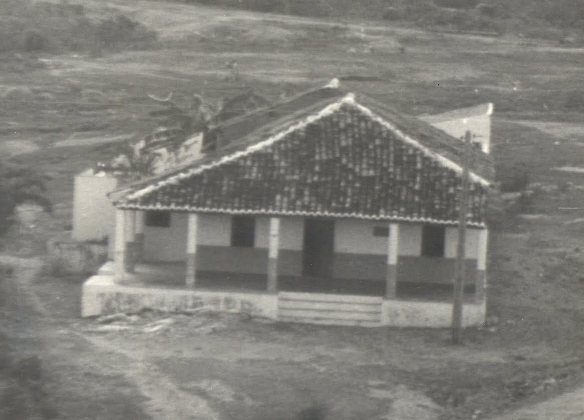 casa onde nasceu Dom Eugênio de Araujo Sales, na Fazenda Catuana, em Acari-RN, Brasil.